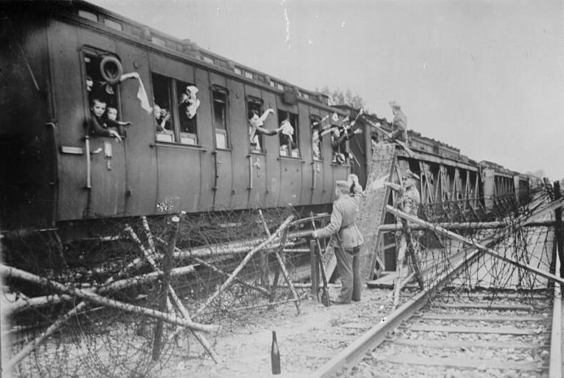 Bentschen, Ankunft deutscher Flüchtlinge aus Posen Ankunft deutscher Flüchtlinge aus Posen in Bentschen. Der Zug passiert die Demarkationslinie bei Bentschen. [Bei Bentschen, deutsche Flüchtlinge aus Posen in einem Eisenbahnwagen]